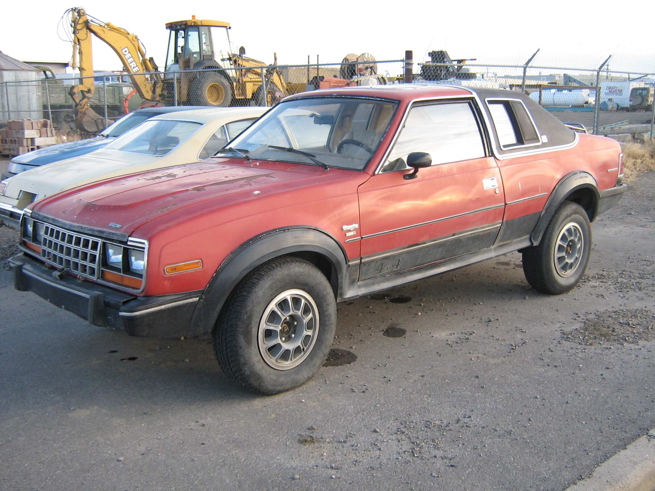 AMC EagleAMC Eagle